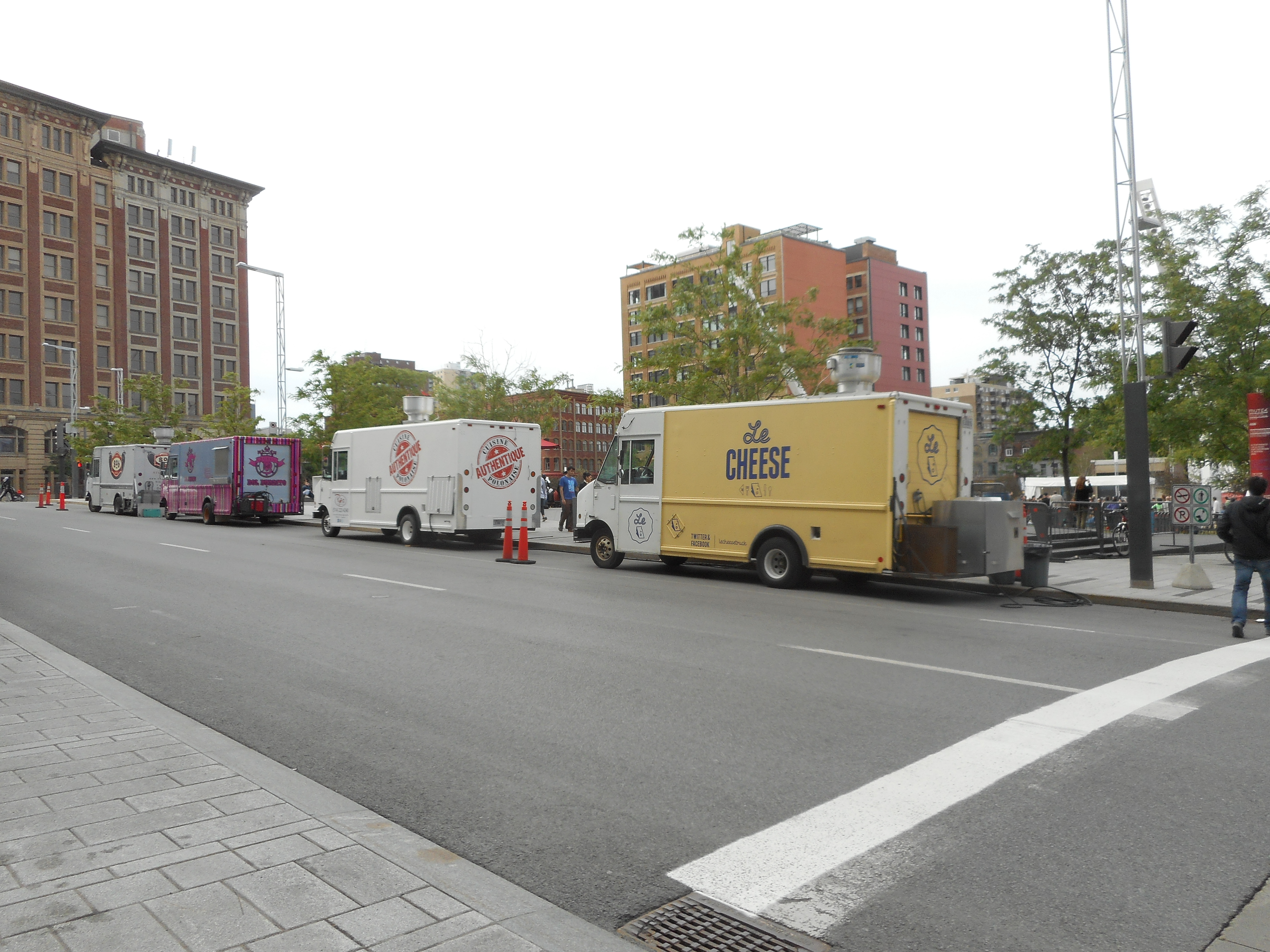 Cuisine de rue à Montréal